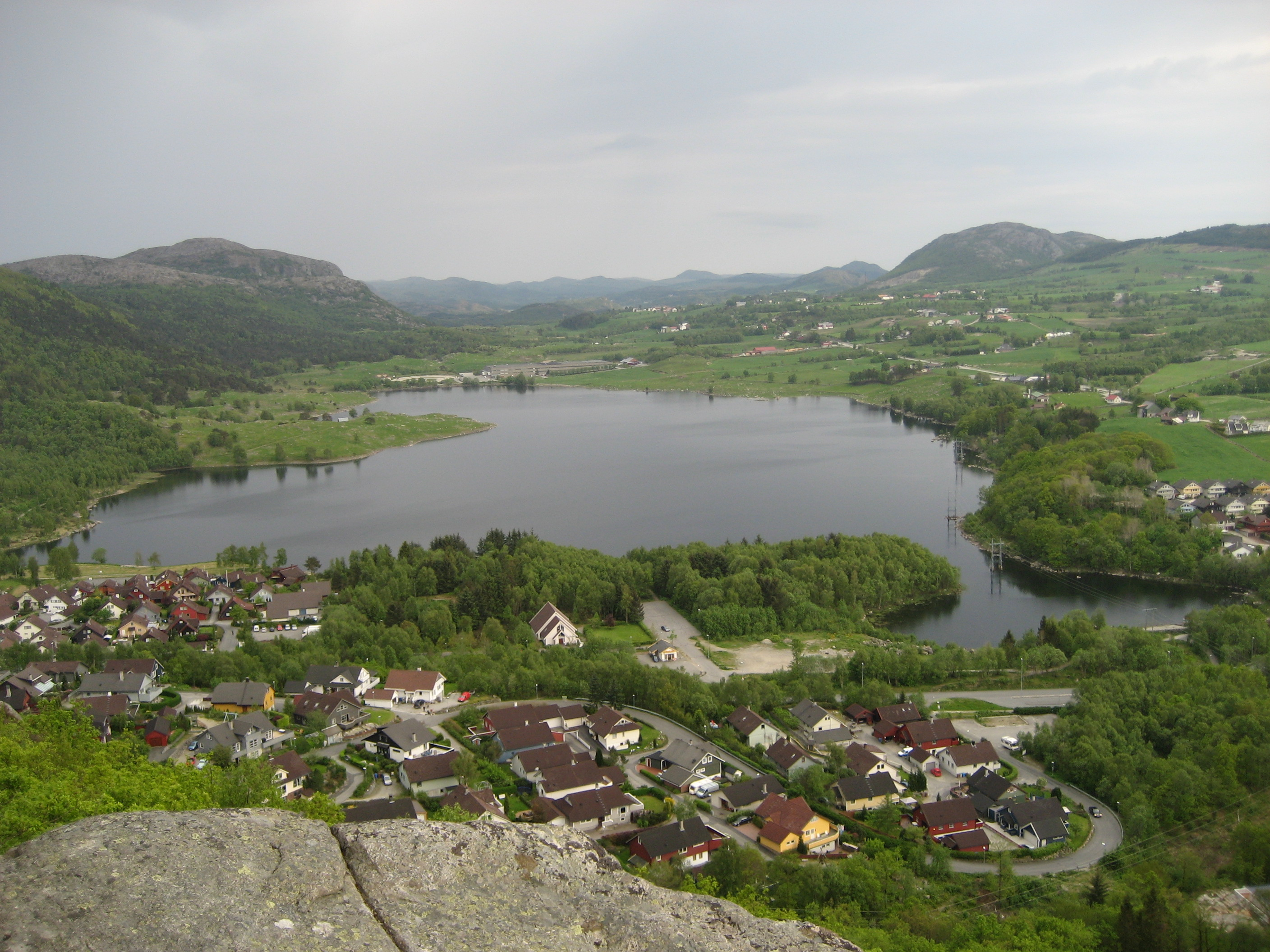 Utsikt over Maudland, Frøylandsvannet og Bjelland fra Hommersandfjellet